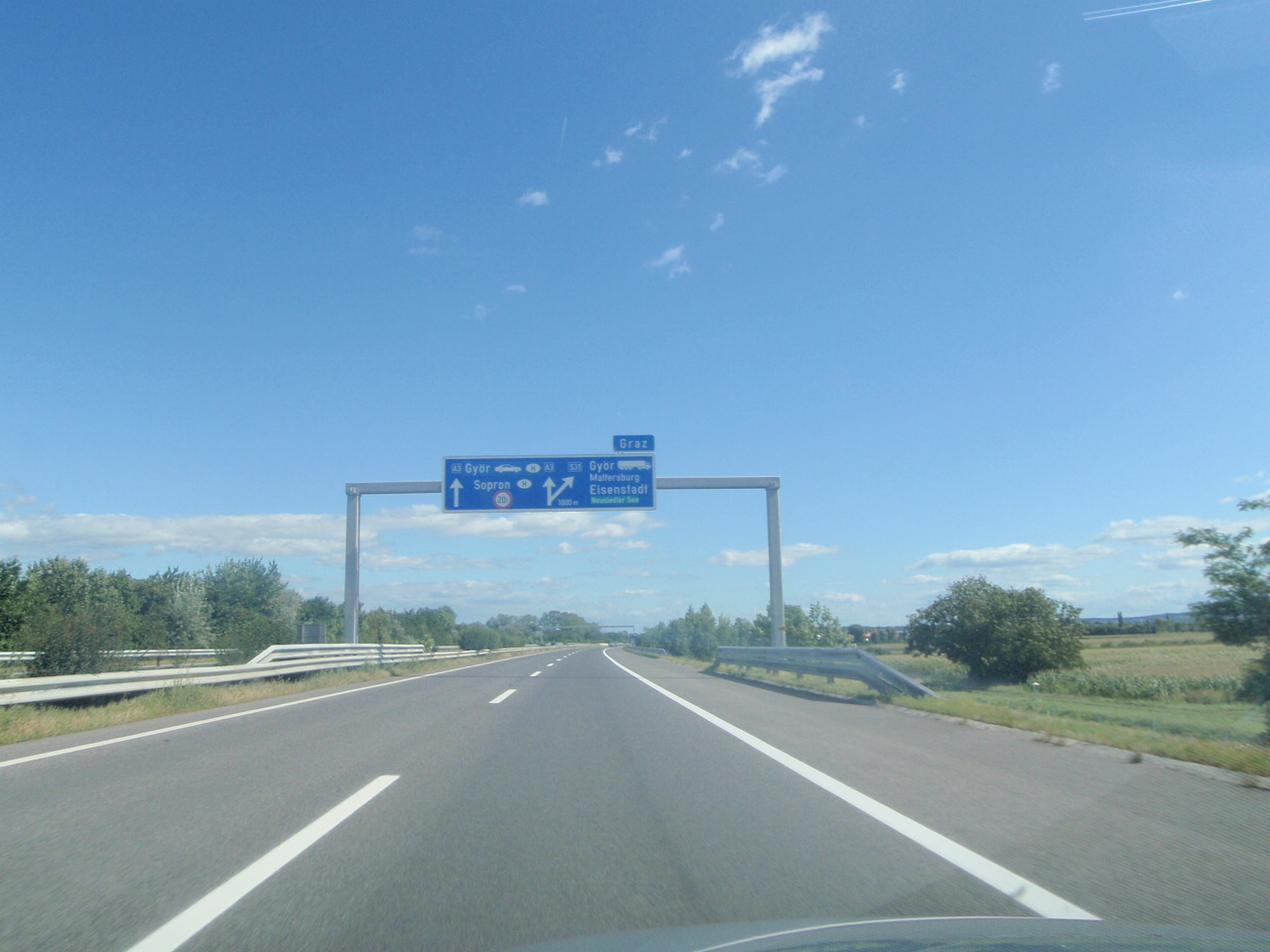 A3 Südostautobahn, Fahrrichting Ödenburg, Knoten S31